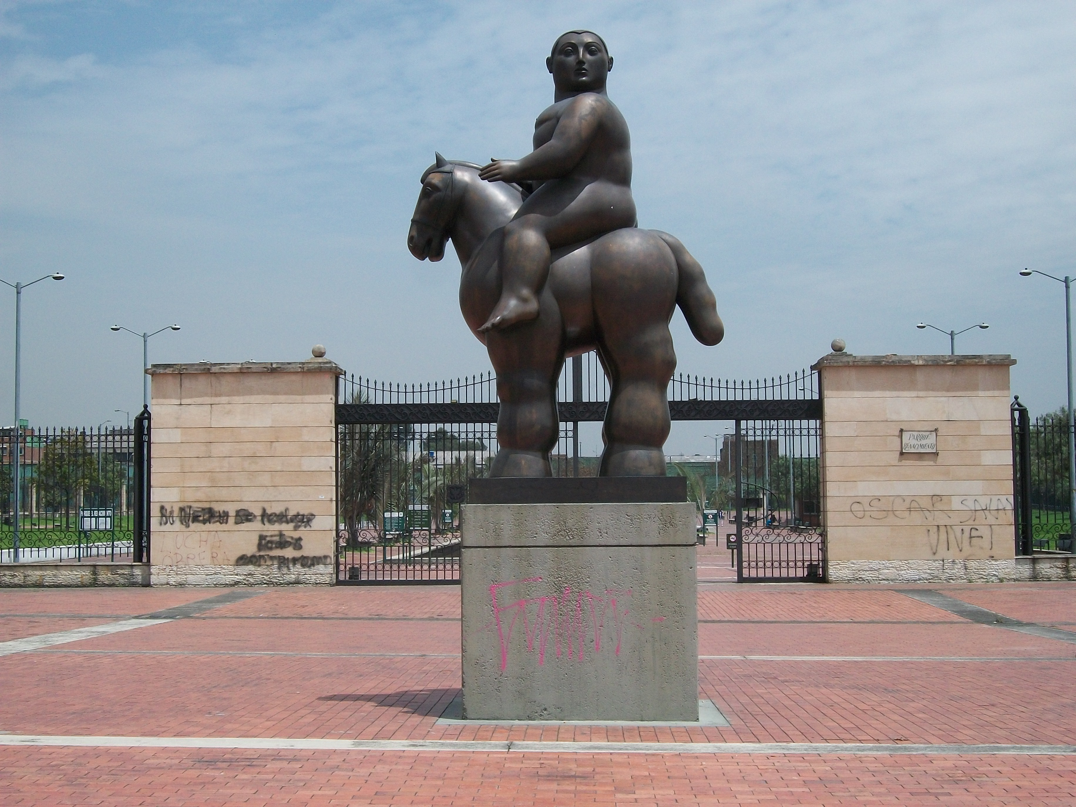 Escultura de Fernando Botero en el parque El Renacimiento de Bogotá.